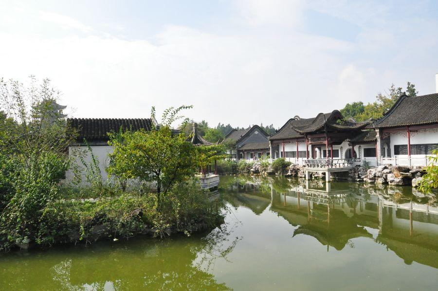 huazhoushuyuan